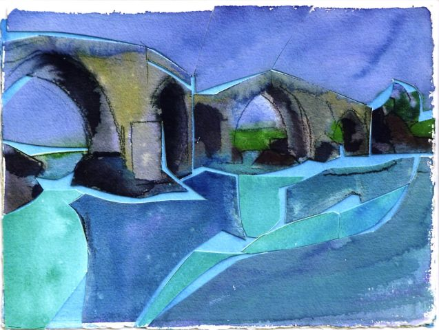 Aquarell/Collage: Köprüpazar Köprüsü - Eurymedon Bridge (Aspendos), 1999